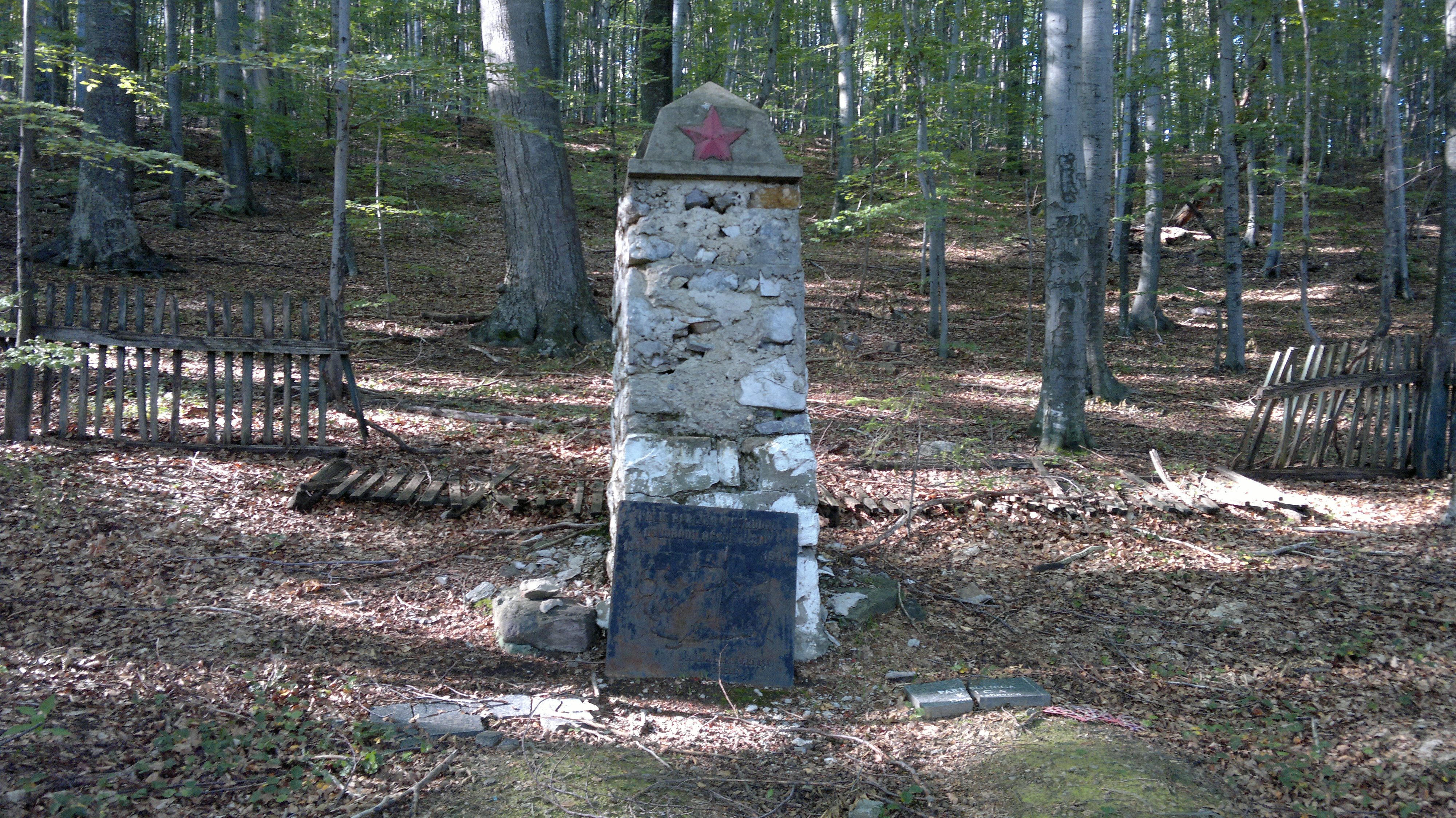 Slatinski Drenovac, Croatia